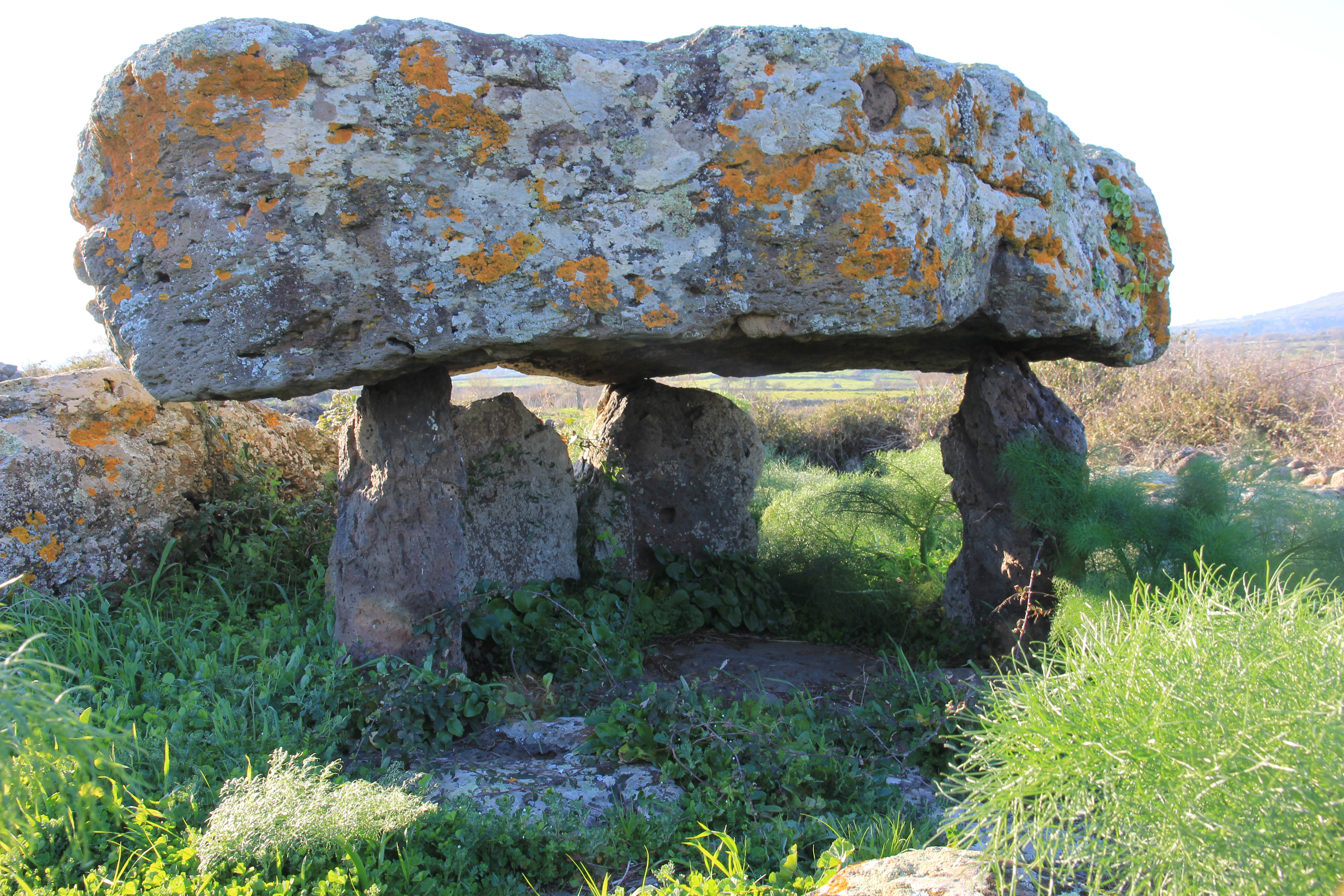 Birori - Dolmen di Sarbogadas - di Sarbogadas